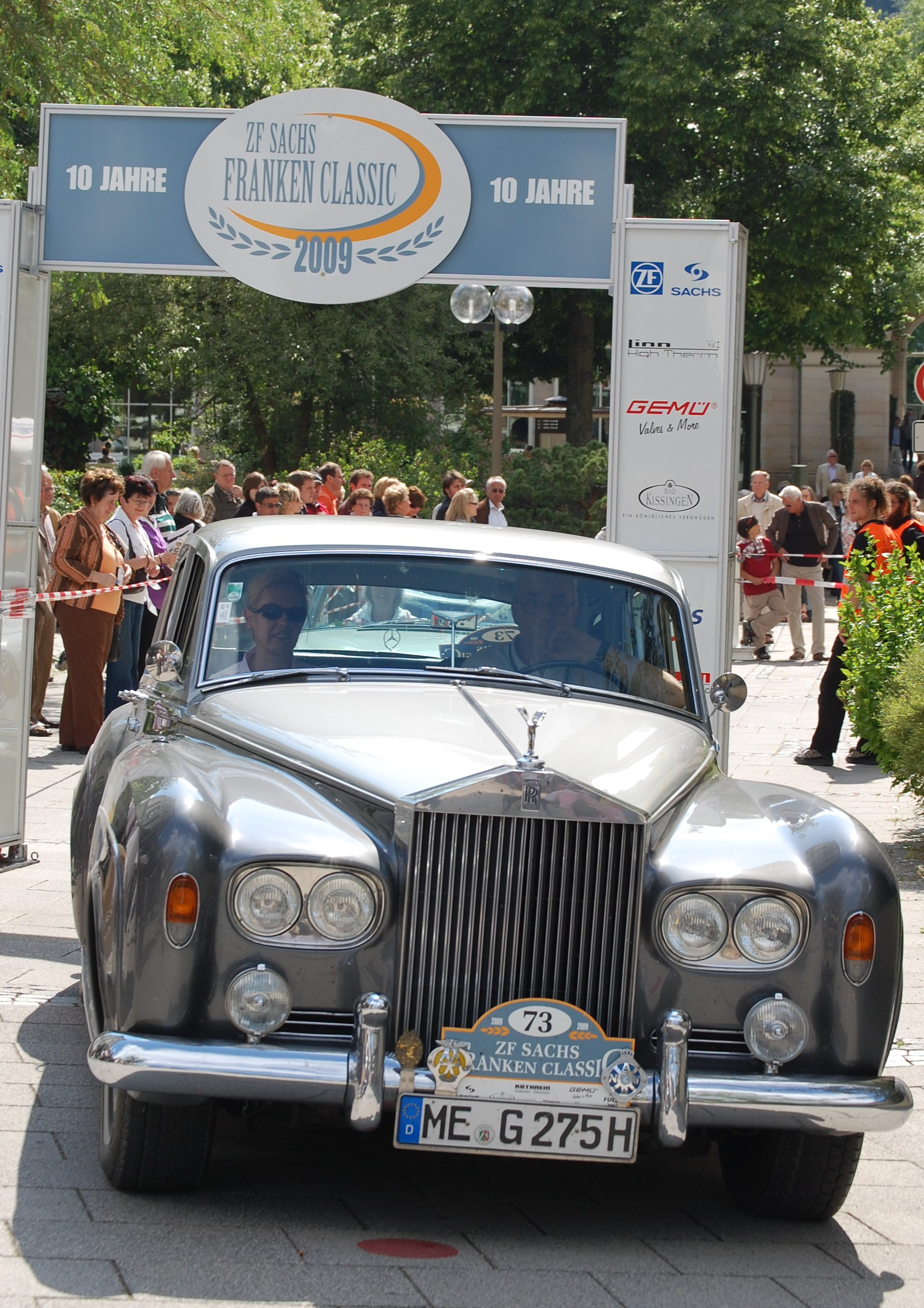 Rolls-Royce Silver Cloud III (1963) bei der Zieldurchfahrt der ZF Sachs Franken Classic 2009 in Bad Kissingen